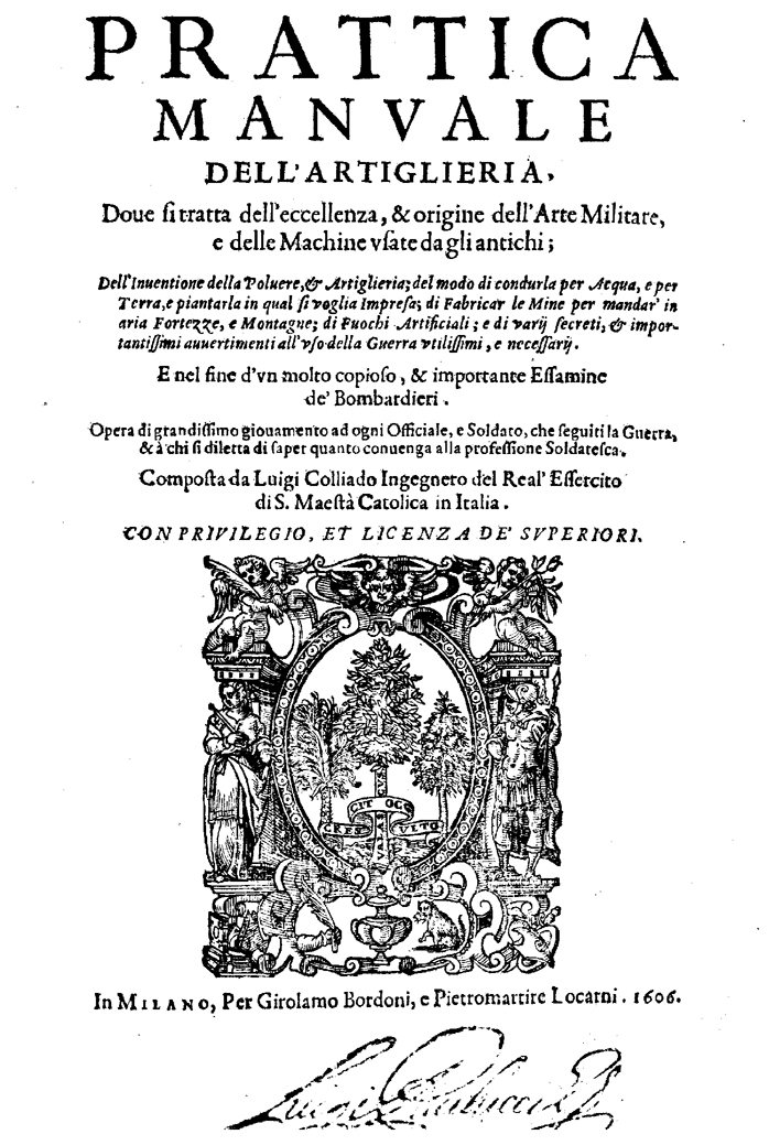 Prattica manuale dell'artiglieria, doue si tratta dell'eccellenza, & origine dell'arte militare, e delle machine vsate da gli antichi; ... composta da Luigi Colliado .... - In Milano : per Girolamo Bordoni, e Pietromartire Locarni, 1606. - [20], 387, [1] p., [15] c. di tav. : ill. ; 4º . Edizione italiana di Platica manual de artilleria.